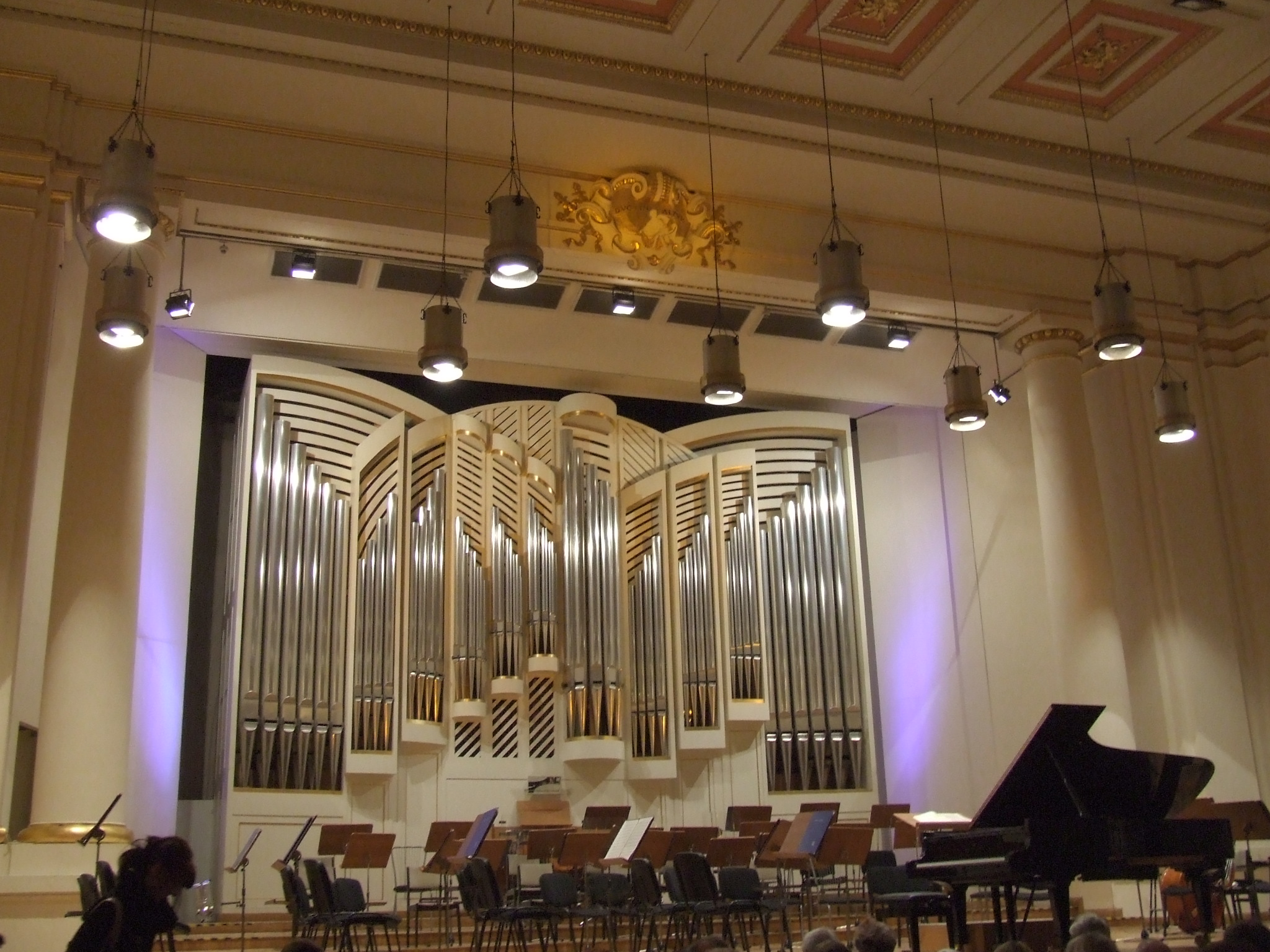 Philharmony of Cracow / Filharmonia Krakowska (pl)